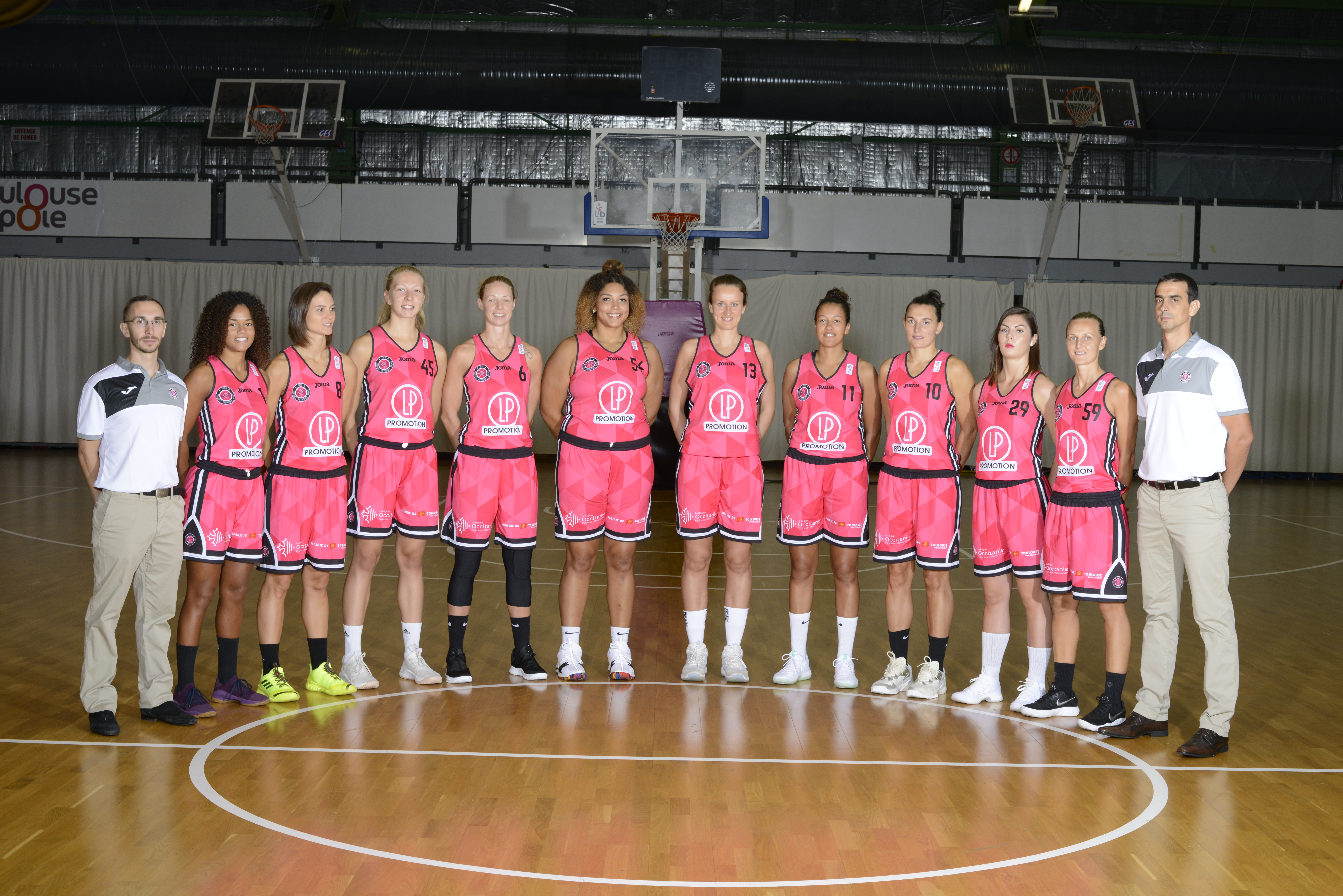 Photo d'équipe de la saison 2018-2019 du Toulouse Métropole Basket